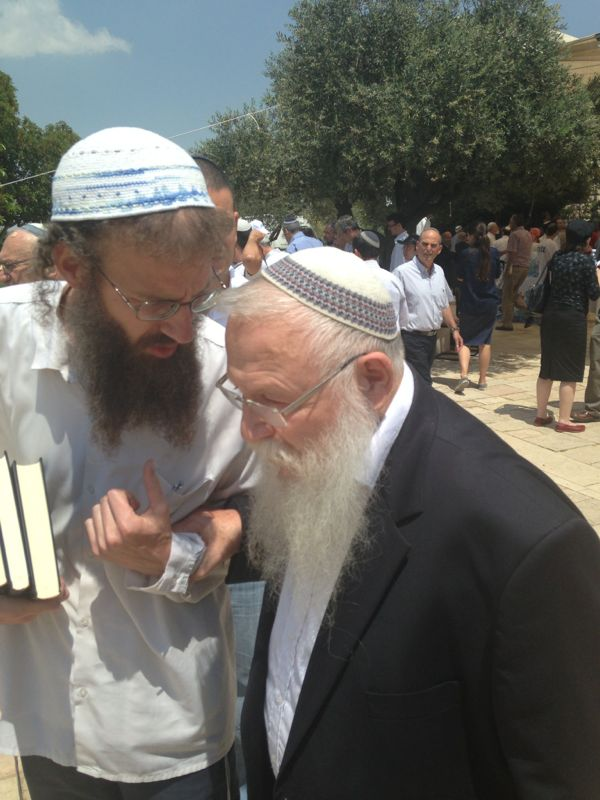 הרב דרוקמן משוחח עם הרב אהרלה הראל בחגיגות ה -80 לרב ליכטנשטיין.